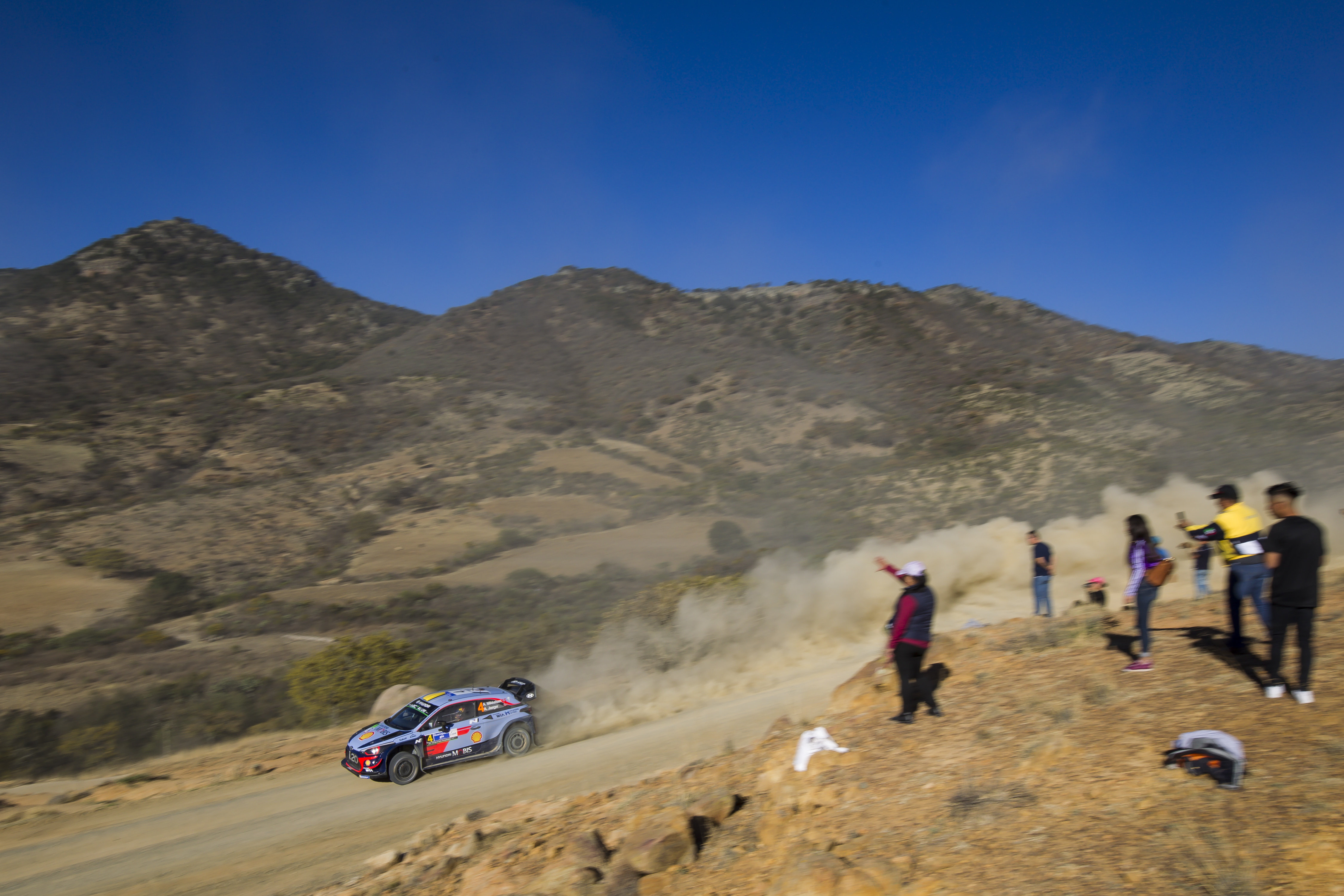 Andreas Mikkelsen i Anders Jæger jadący Hyundaiem i20 Coupe WRC podczas Rajdu Meksyku 2018